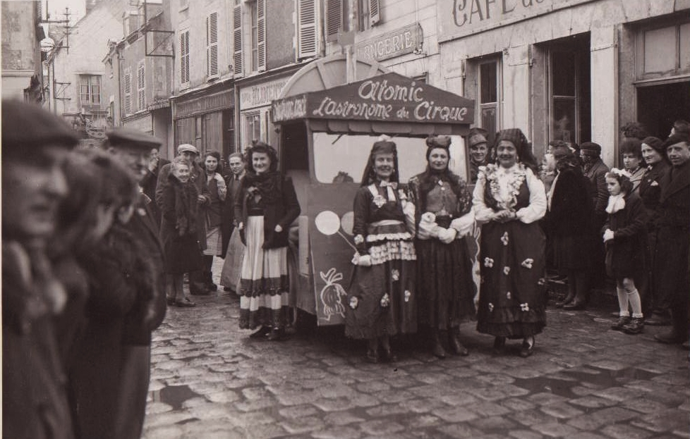 Carnaval de Jargeau, Loiret, France